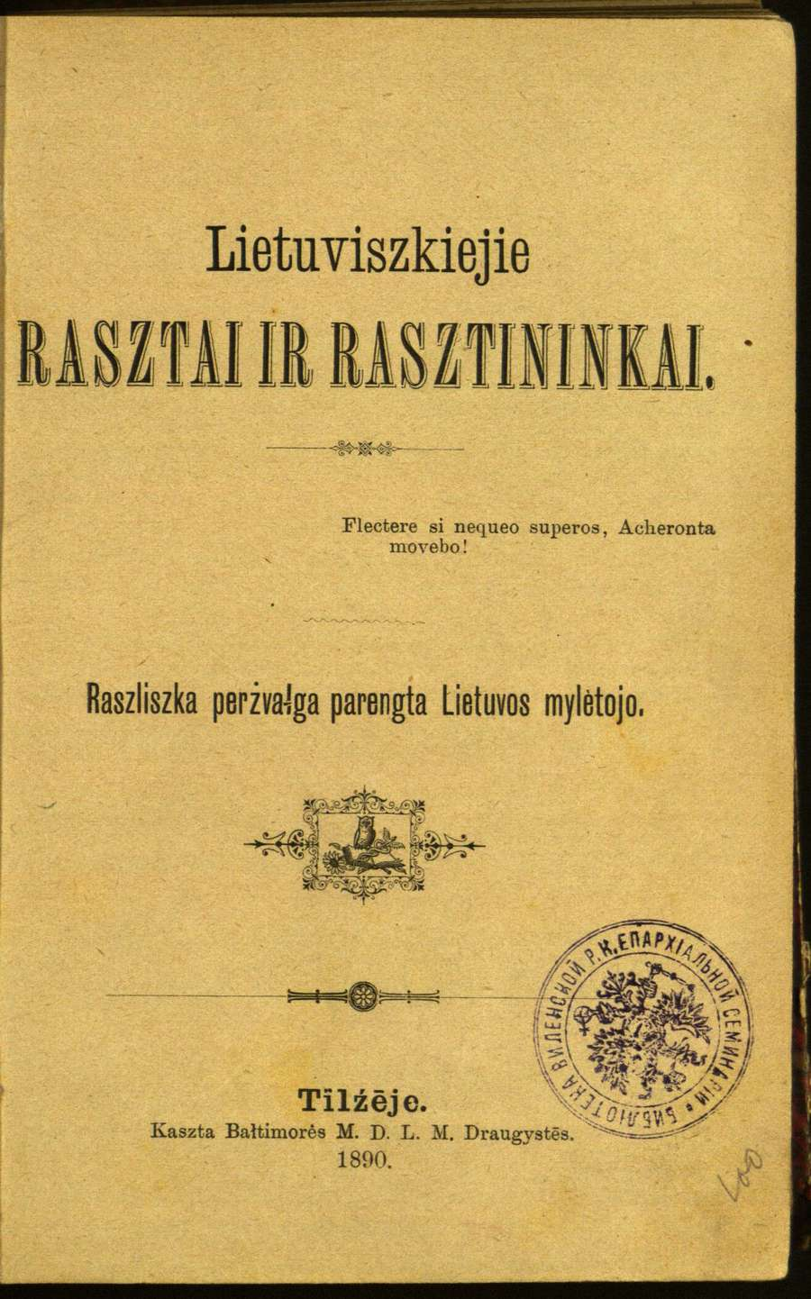 Title page of Lietuviszkiejie rasztai ir rasztininkai published in Tilsit, East Prussia